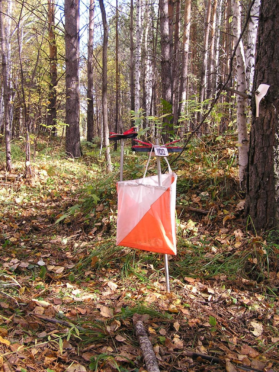 Ориентирование - КП